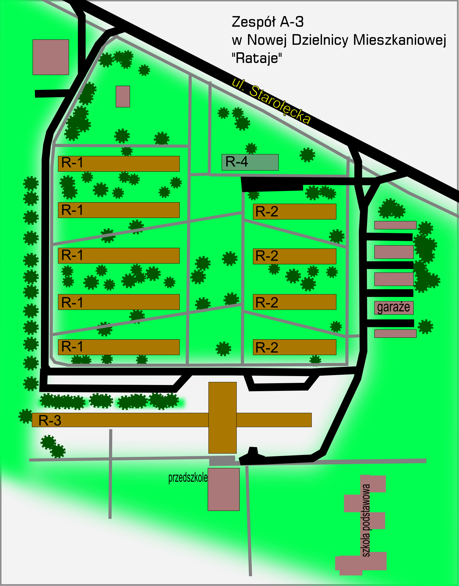 Plan zespołu A-3 w jednostce mieszk. A (os. Piastowskie). Oznaczone typy budynków (R-1, R-2, R-3, R-4 [plan]).